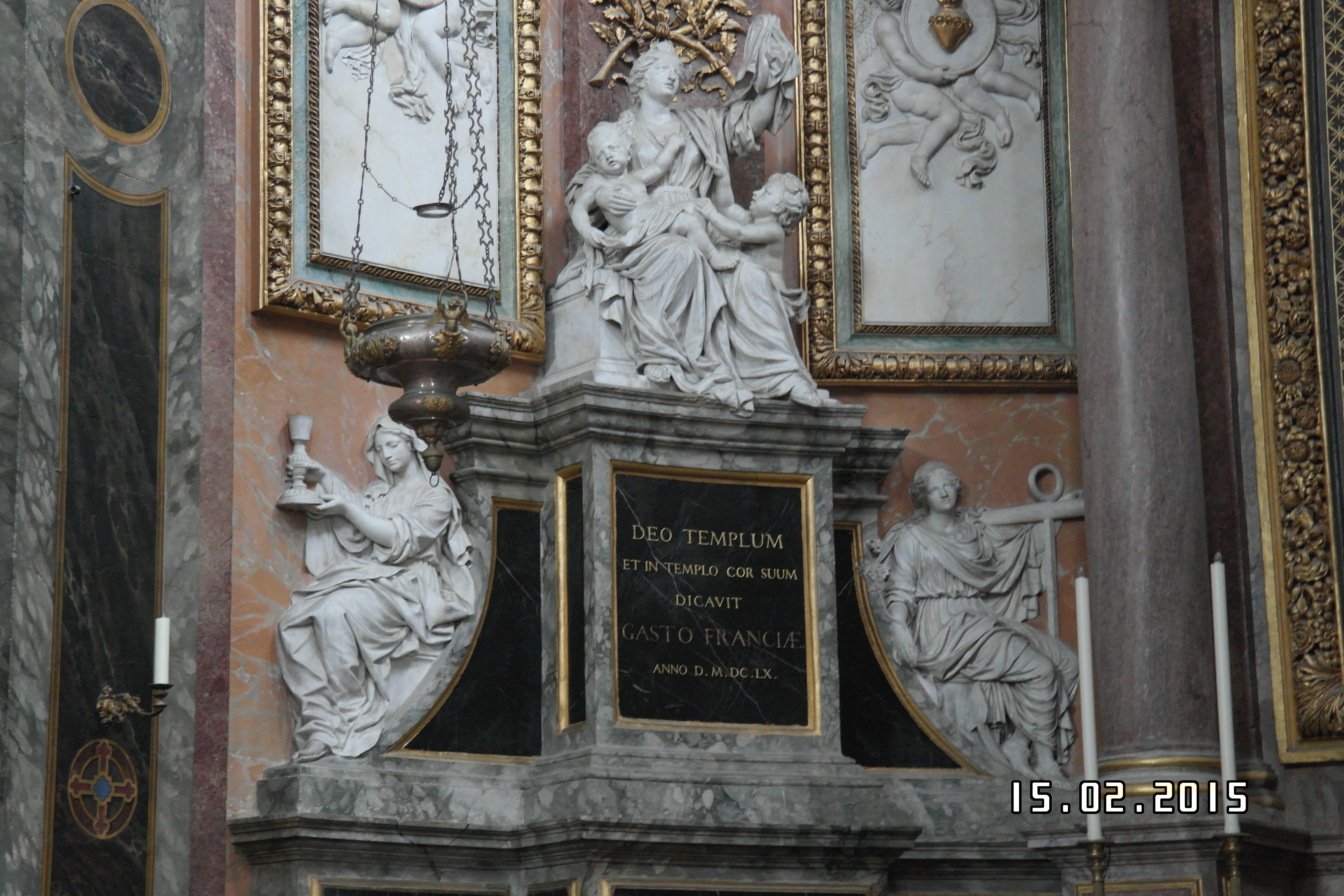 Monument à Gaston d'Orléans, chapelle Saint-Vincent, Blois